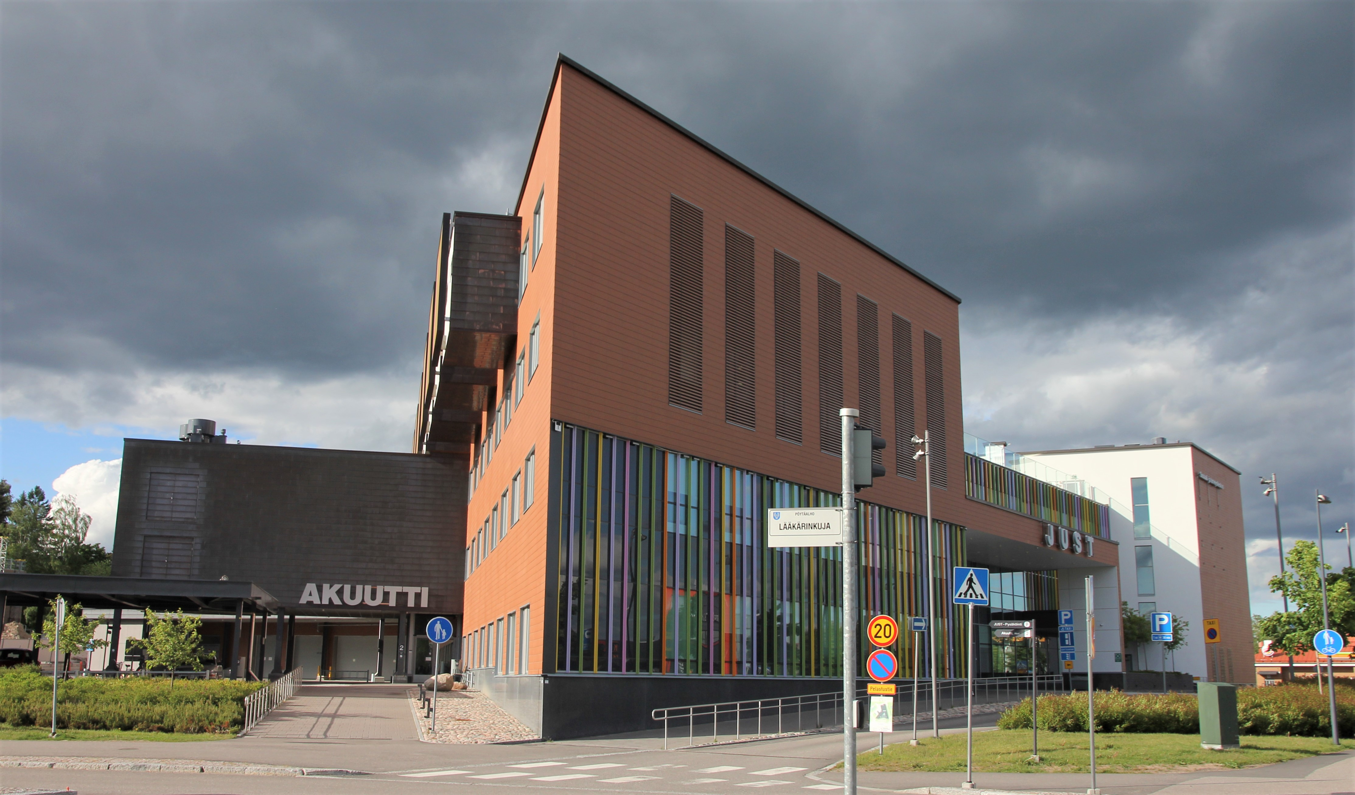 Järvenpään uusi sosiaali- ja terveyskeskus (JUST) tarjoaa julkisen palvelun terveydenhoitoa Järvenpäässä. Terveyskeskuksen osoite on Lääkärinkuja 1, joka on Järvenpään Pöytäalhon kaupunginosassa.